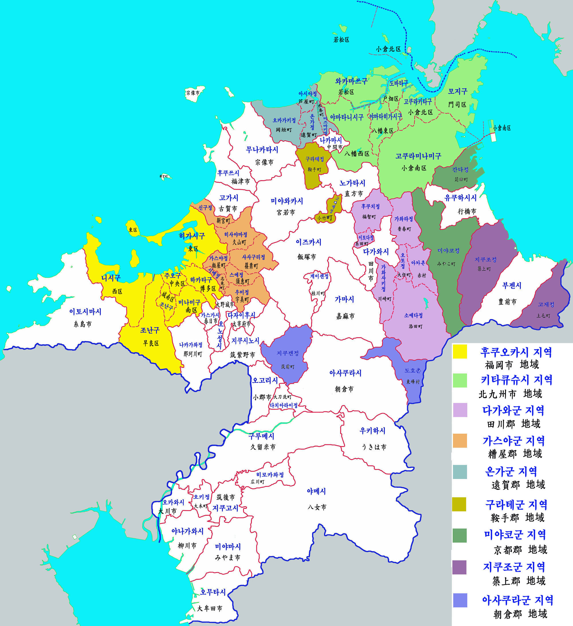 후쿠오카현 행정구역